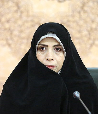 امین‌زاده در نشست معاونین حقوقی دستگاه‌های اجرایی دولت یازدهم-دی ۱۳۹۳